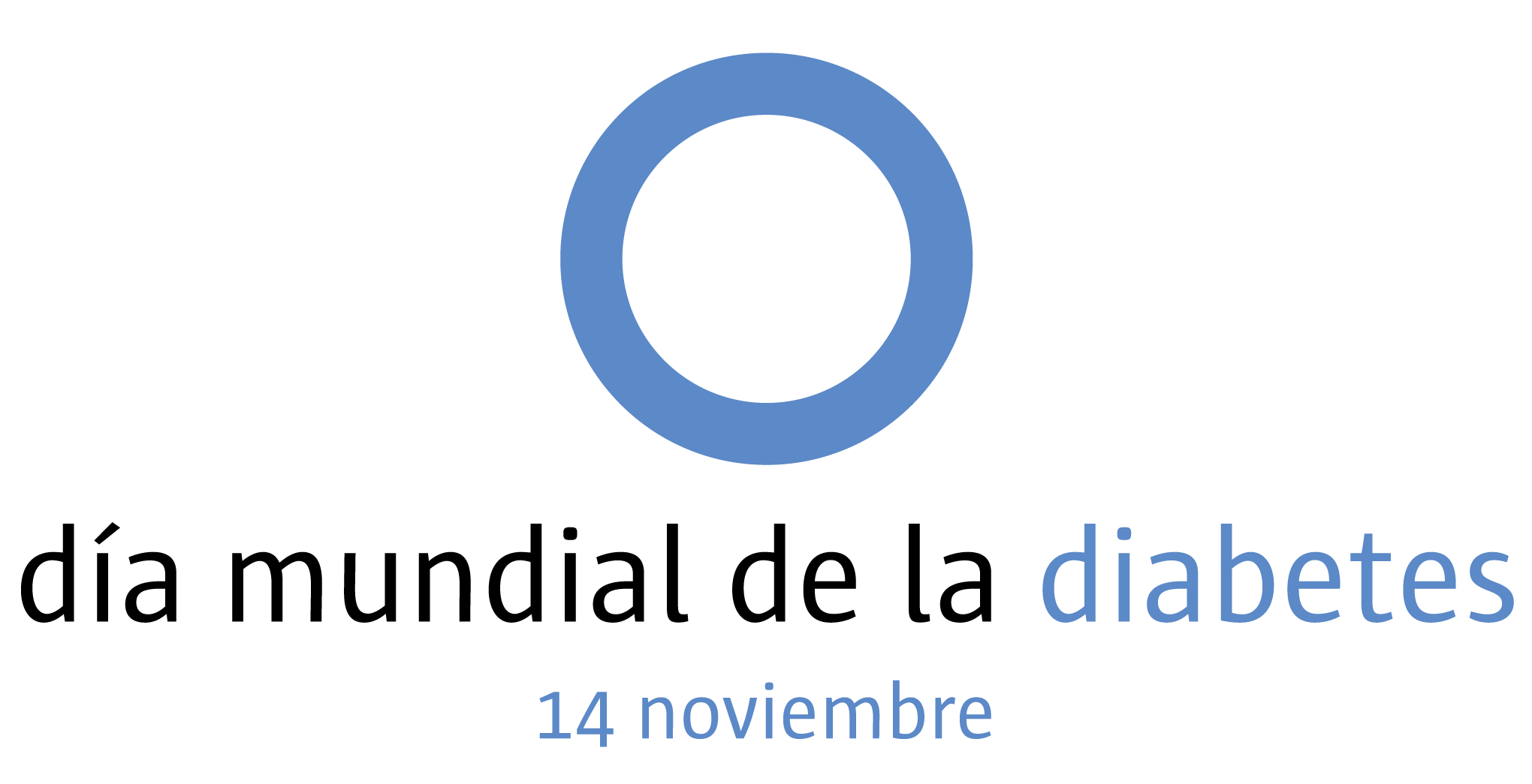 El logotipo del Día Mundial de la Diabetes es el círculo azul, el símbolo global de la diabetes. El círculo simboliza la unidad mundial de la comunidad de la diabetes en respuesta a la pandemia de la diabetes.